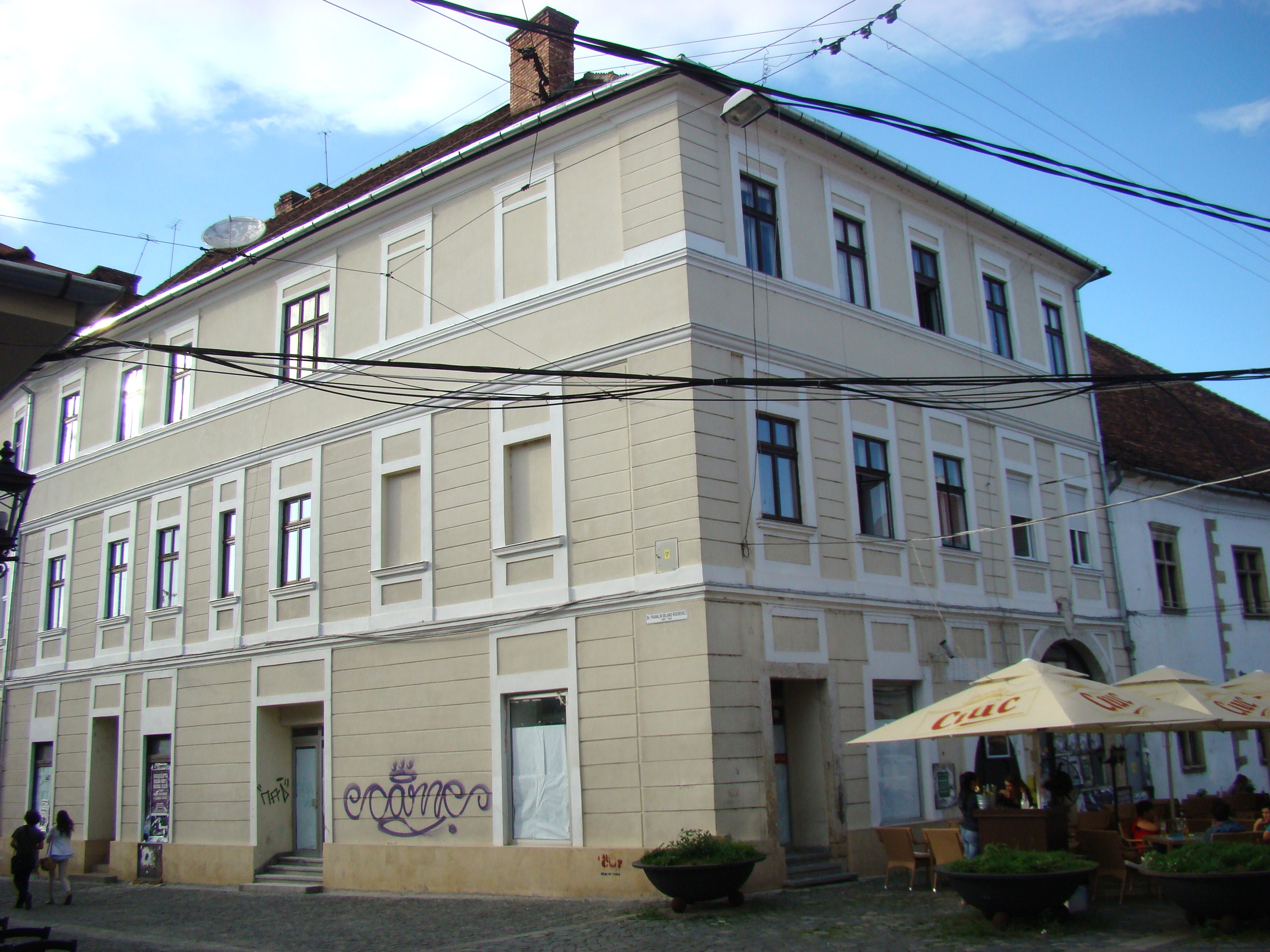 Clădire monument istoric, str.Roosevelt, nr.2